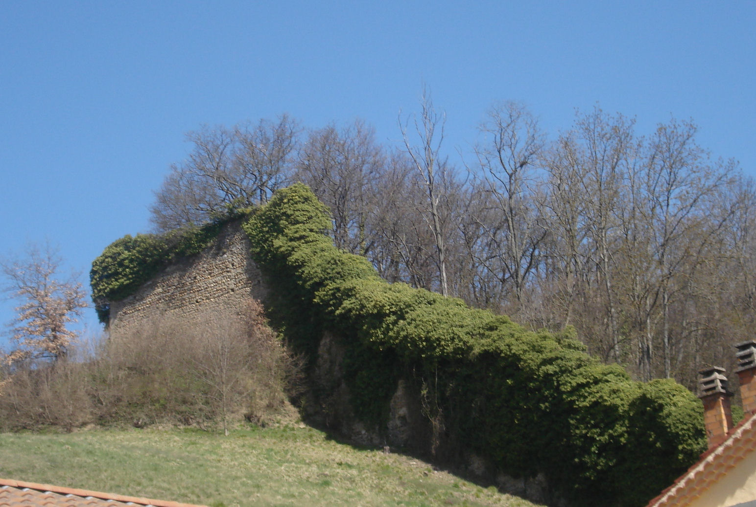 ruines du château vieux (XIIe siècle) situé à Hauterives (Drôme)